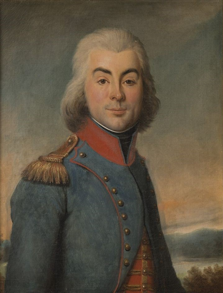 Commandé par Louis-Philippe pour le musée historique de Versailles en 1835